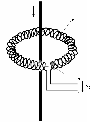 Bildbeschreibung: Darstellung einer Rogowskispule um einen sStromführenden Leiter gelegt Fotograf/Zeichner: Fesalz Datum: 25.01.2006 Möglichkeiten zur Lizenzierung